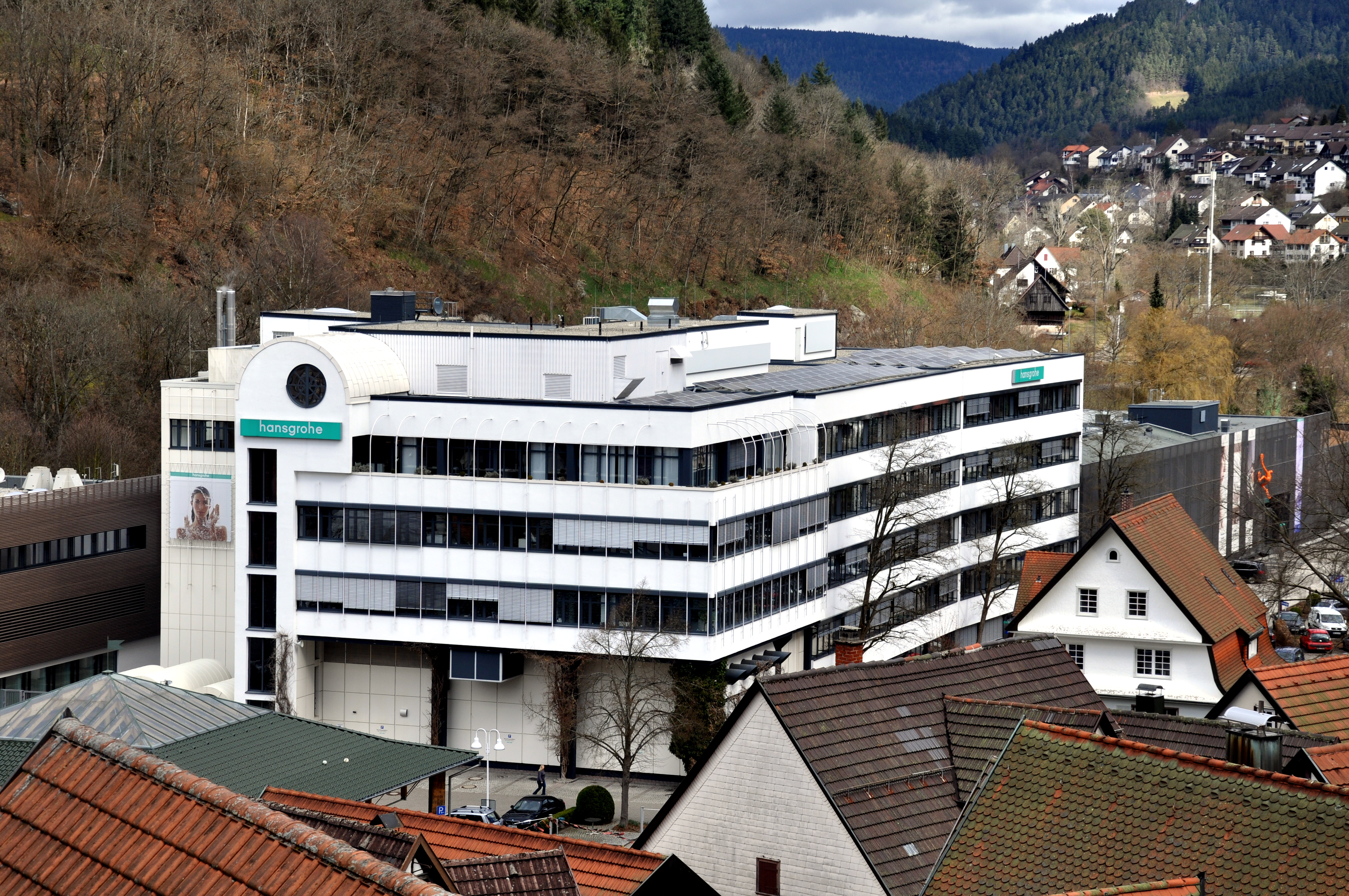 Schiltach, hansgrohe-Werk